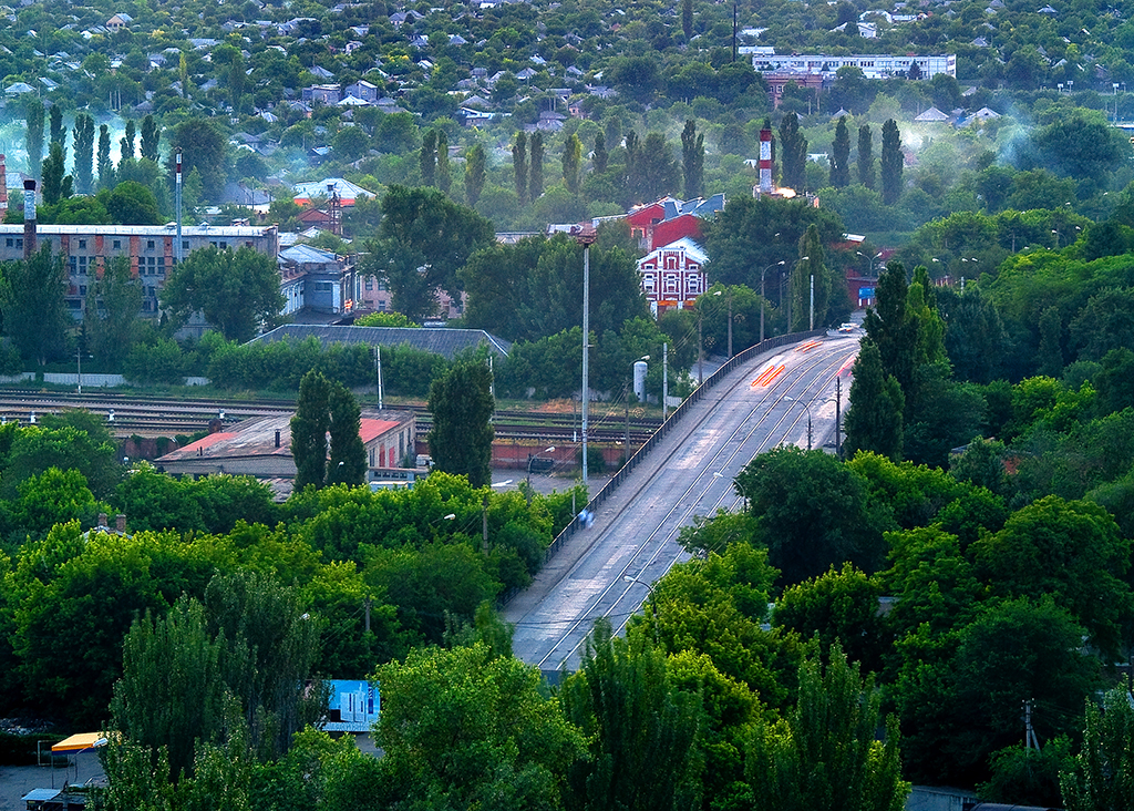 Мост через жд. вокзал. Луганск.6 июня 2006